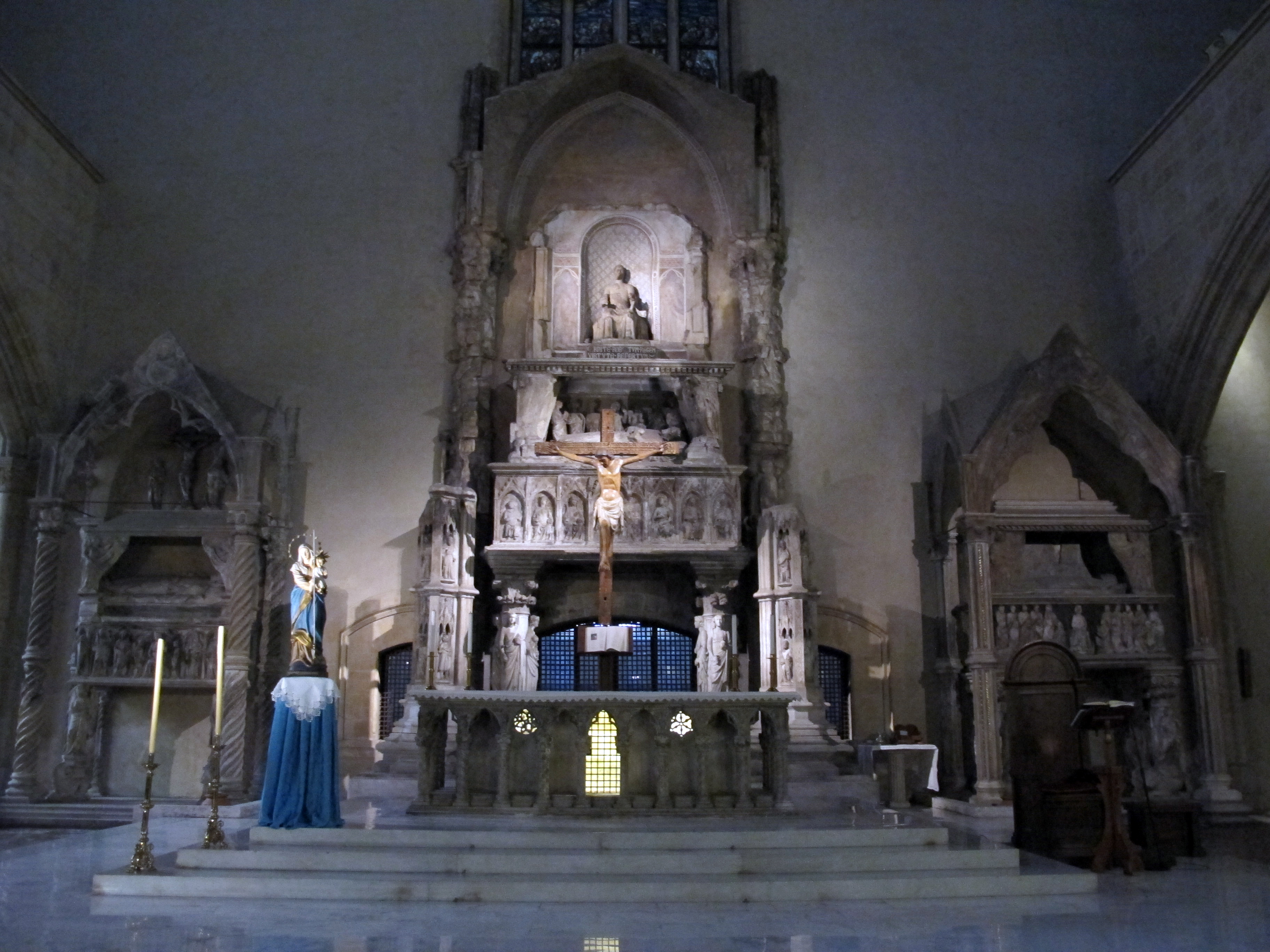 Santa Chiara (Napoli)